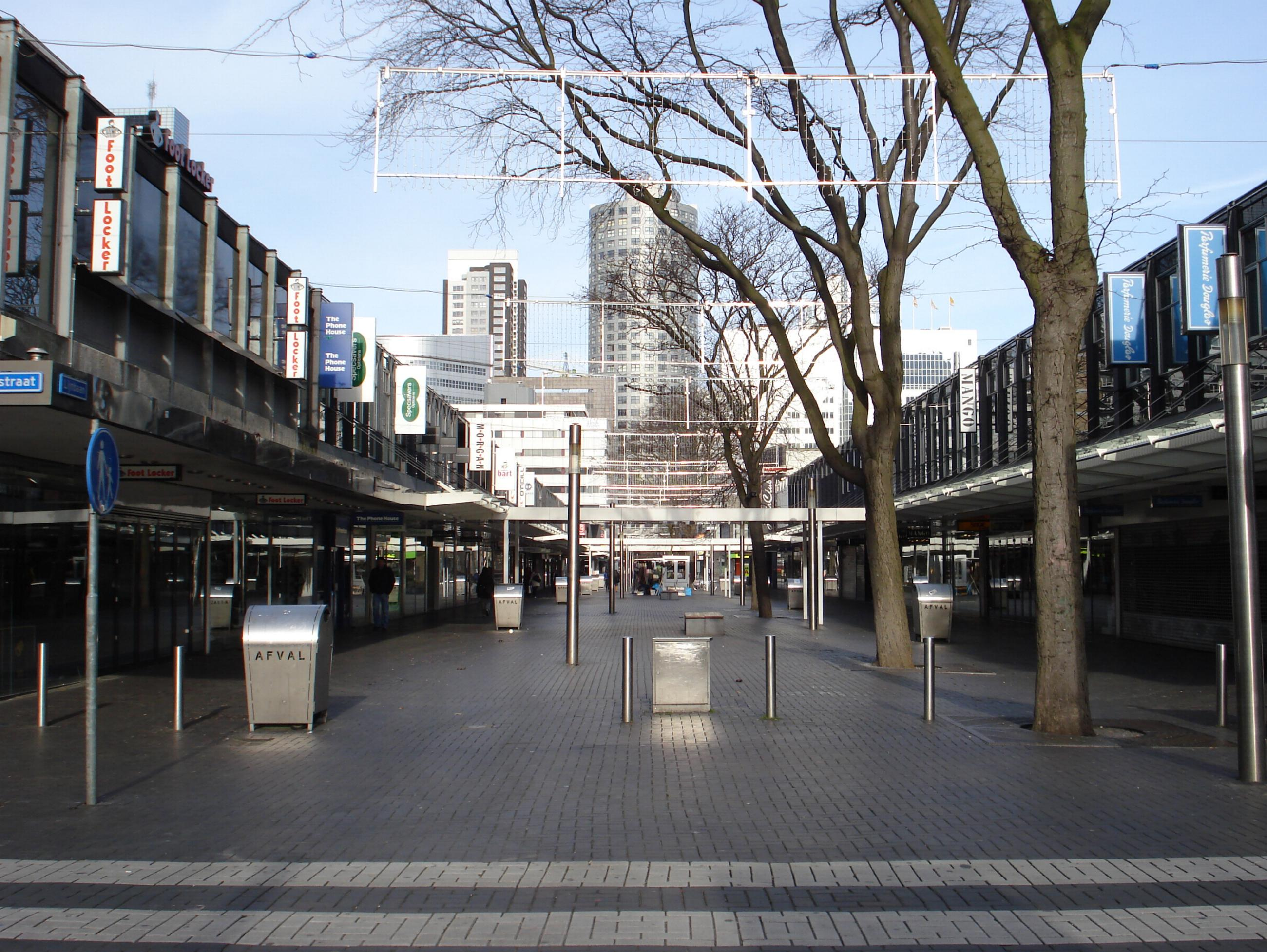 Rotterdam, Lijnbaan. Voorgedragen als rijksmonument, oktober 2007.